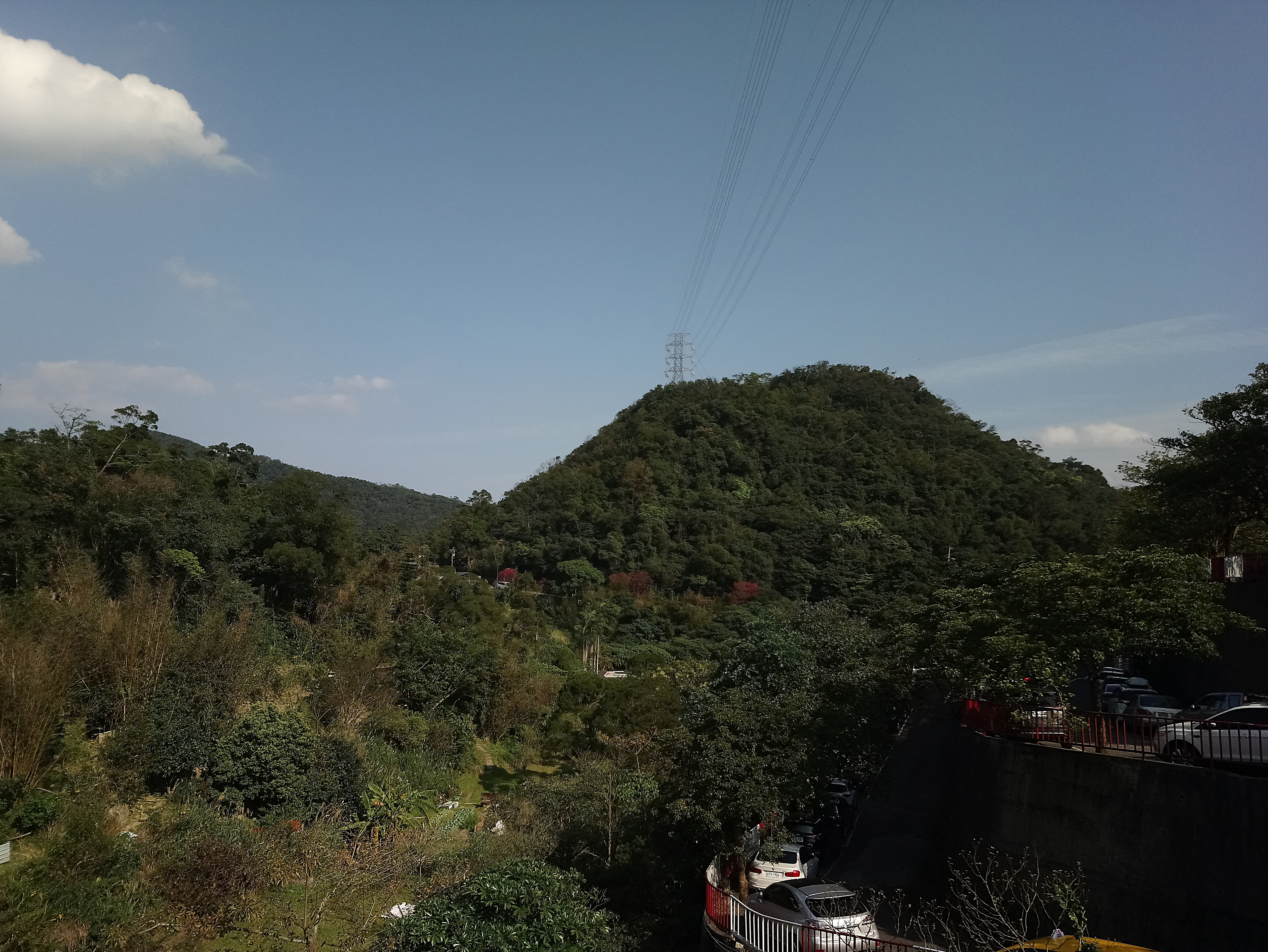 新里族內的圓覺尖（右）,臺北市內湖區金龍次分區碧山里